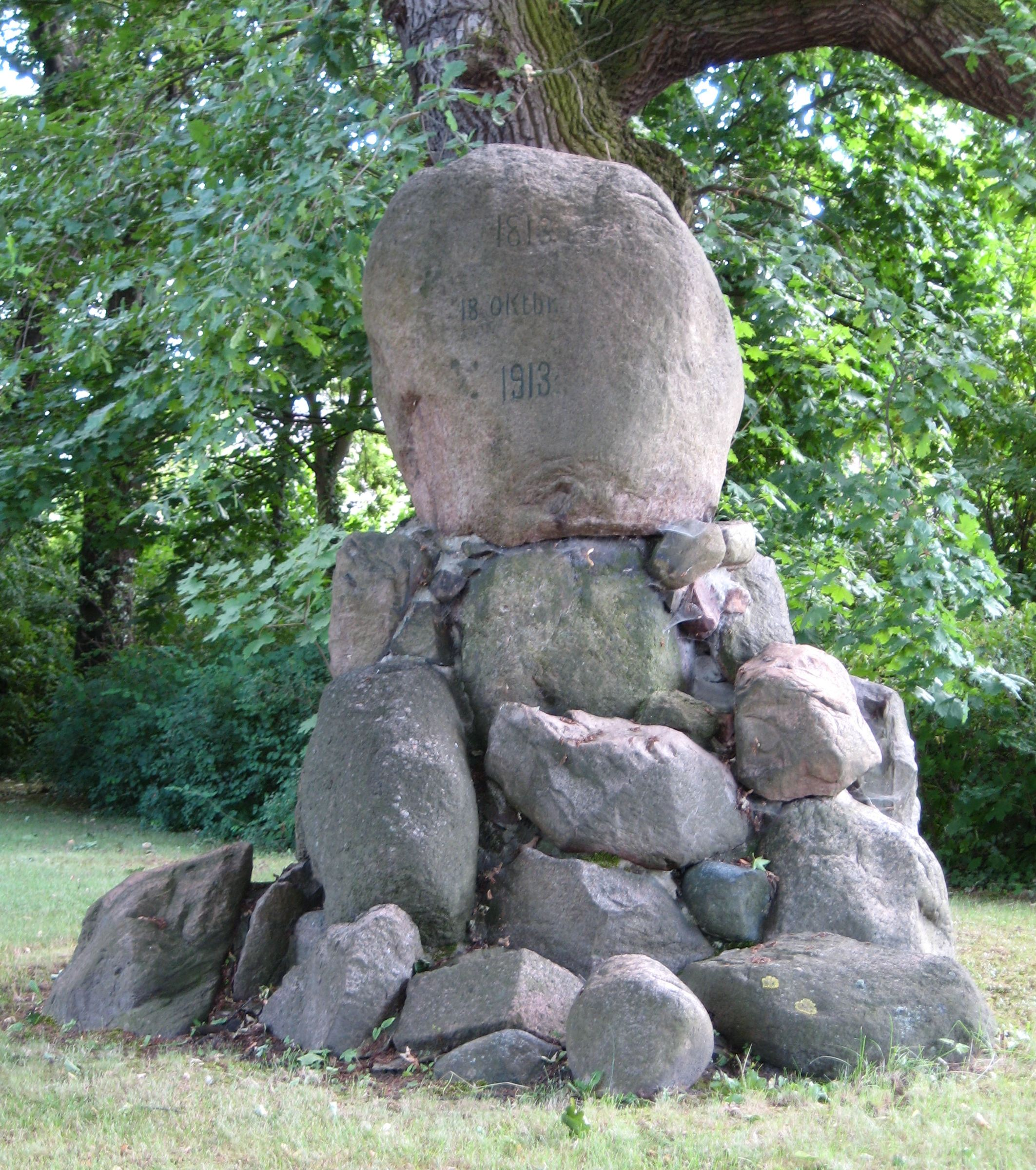 Denkmal in Piethen